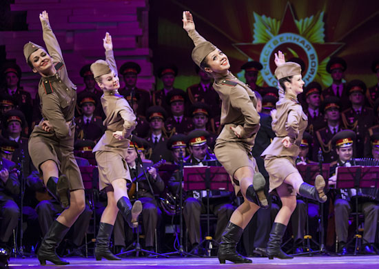 Академический ансамбль песни и пляски Российской Армии имени А. В. Александрова